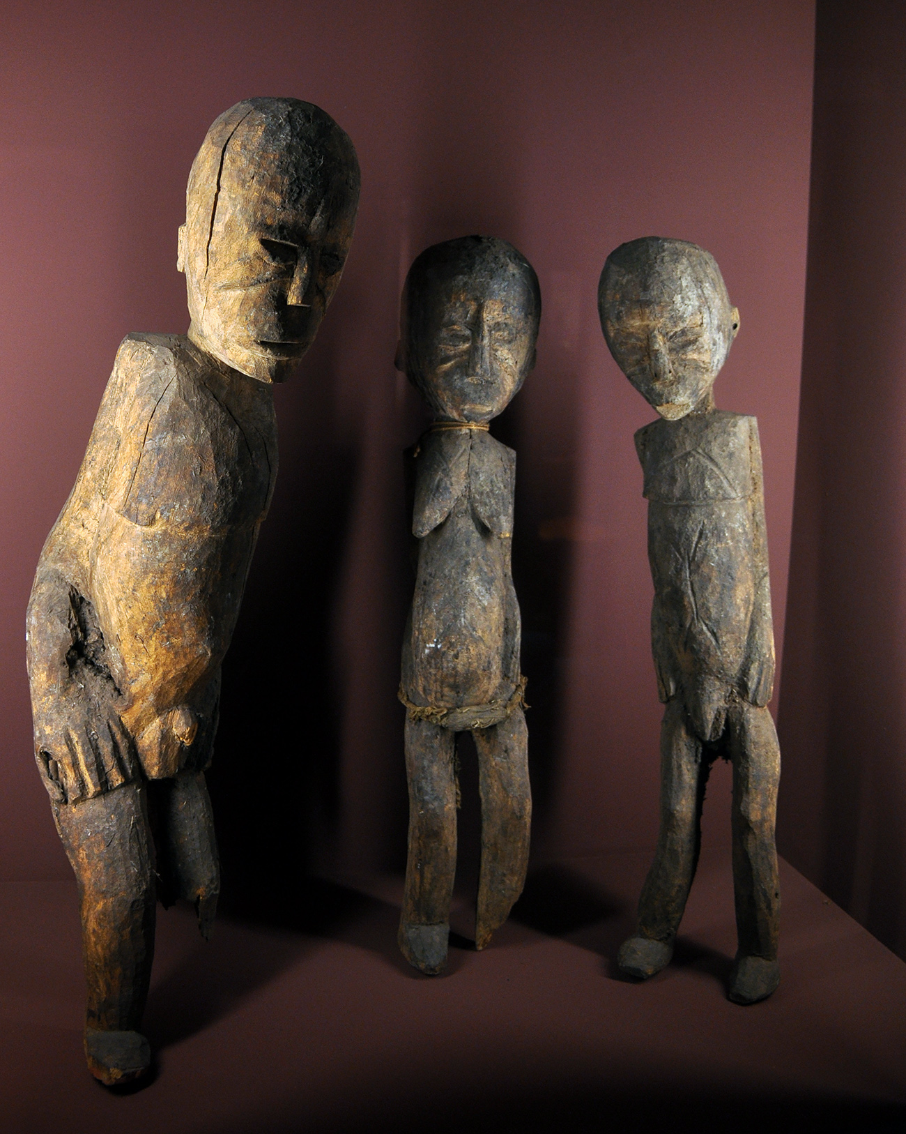 Trois statues provenant du Togo, vers 1910. Elles appartiennent à la culture Kabiyé ( ou Kabyé ) mais leur style rappelle les oeuvres de la culture Lobi. Musée africain à Lyon.